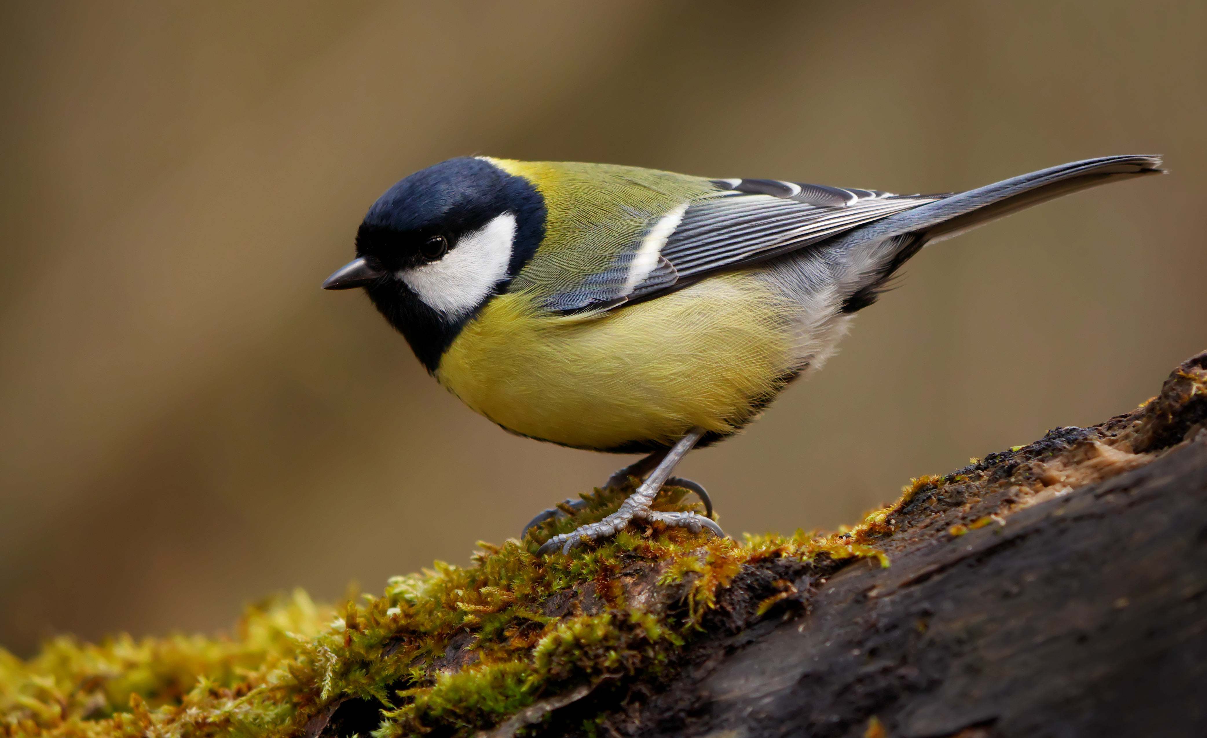 Panasonic GX7 + Panasonic Lumix G Vario 100-300, O.I.S